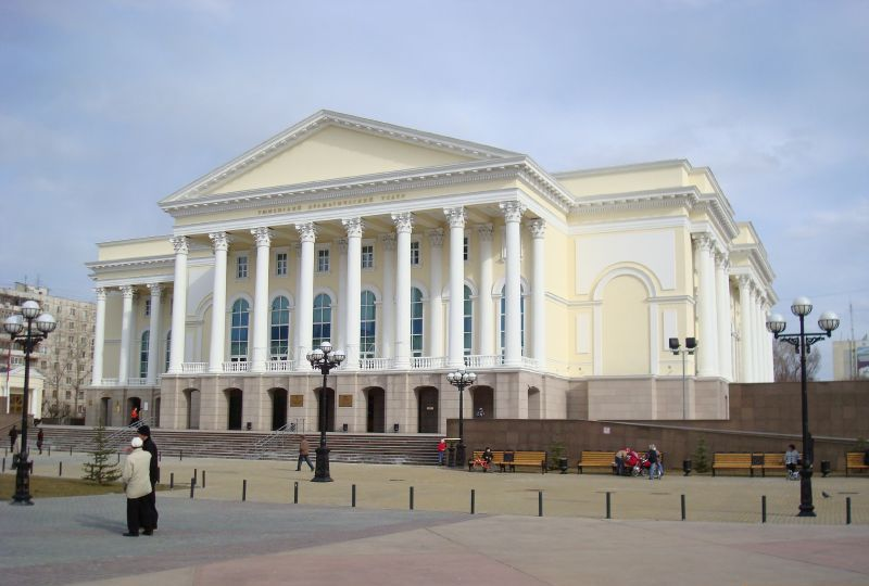 La Tjumena provinca teatro de dramo kaj komedio (Tjumeno, Rusio)